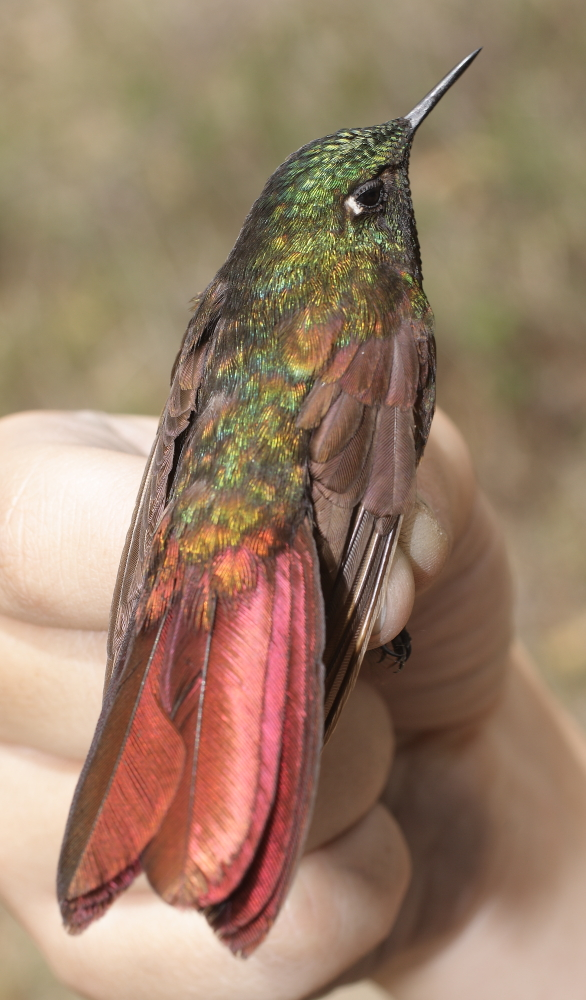 Metallura iracunda Birds of Serranía de Perijá of Colombia and Venezuela (Ornitologia Colombiana [2014] 14: 62–93)